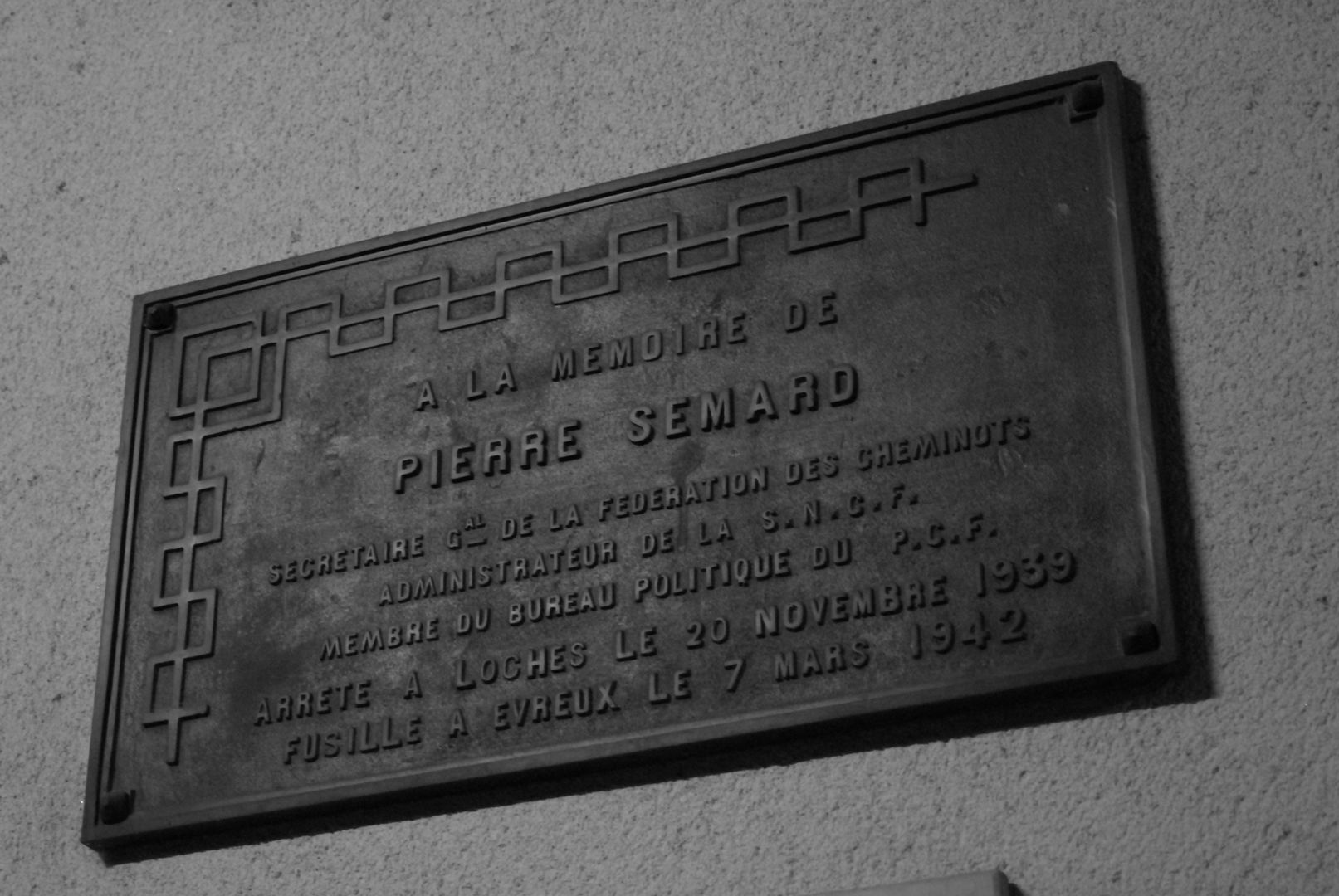 Plaque commémorative sur le mur du bâtiment voyageurs de la gare du Loches. Cote voies.